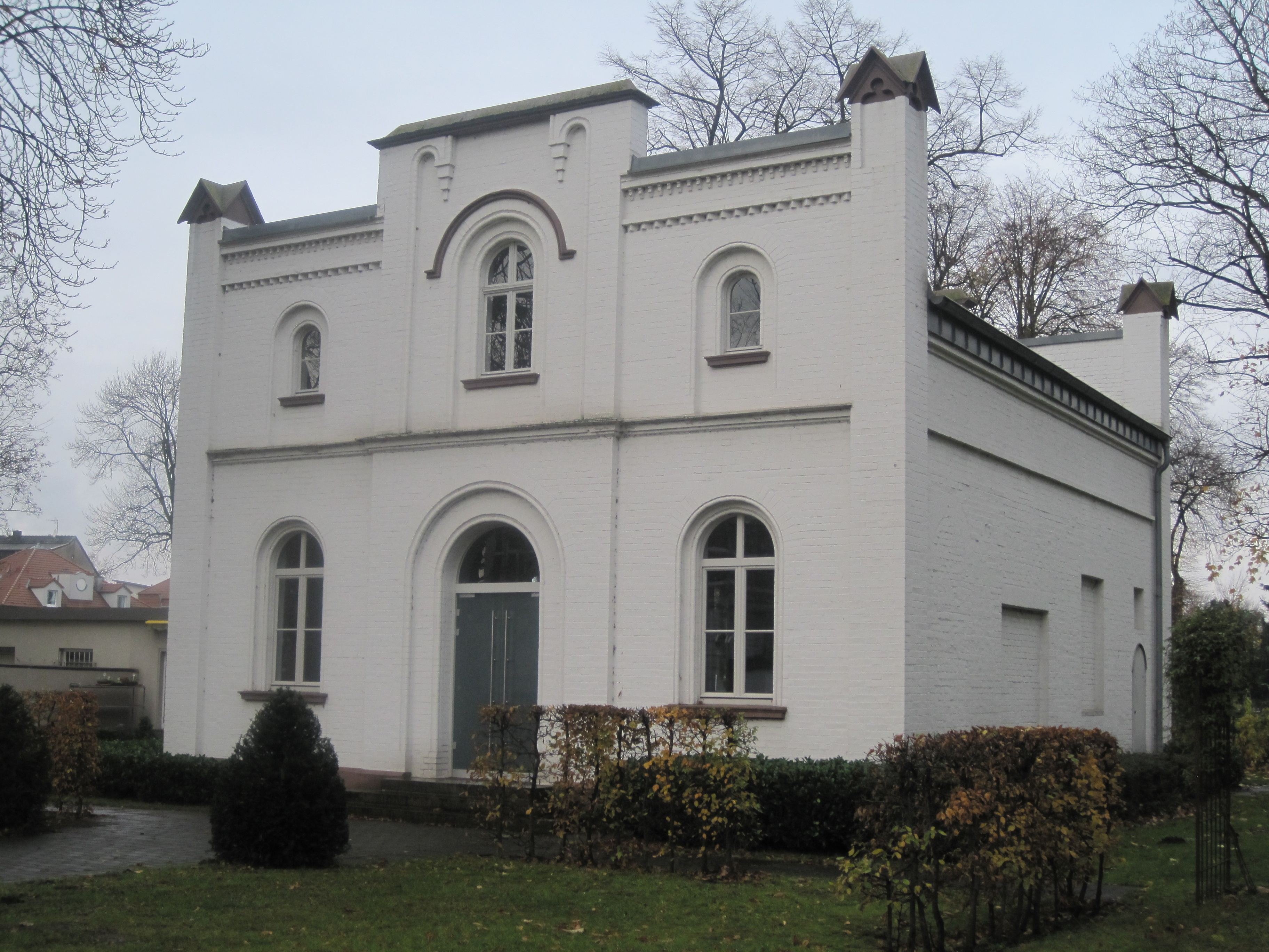 Evangelische Kapelle, Trauerhalle des Ostenfriedhofs in Hamm, Südansicht